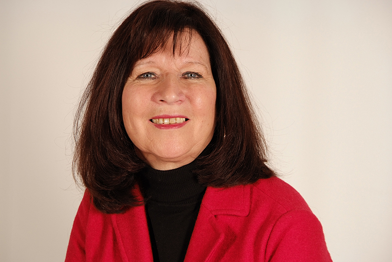 Ulla Groskurt, Landtagsabgeordnete Niedersachsen, 16. Wahlperiode (Fotoprojekt Landtagsabgeordnete Niedersachsen am 24. und 25. November 2009)